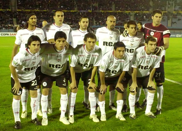 Una formación del equipo de Estudiantes de La Plata que se consagró campeón de la Copa Libertadores 2009. Arriba: Marcos Angeleri, Leandro Desábato, Christian Cellay, Juan Sebastián Verón (Capitán), Germán Re y Mariano Andújar; abajo: Rodrigo Braña, Enzo Pérez, Leandro Benítez, Juan Manuel Salgueiro y Mauro Boselli, máximo goleador del torneo con 8 conquistas.